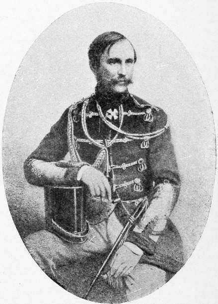 Данное изображение было использовано в статье «Васильчиковы» опубликованной в пятом томе «Военной энциклопедии», который был издан книгоиздательским товариществом Ивана Дмитриевича Сытина в 1911 году в столице Российской империи городе Санкт-Петербурге.